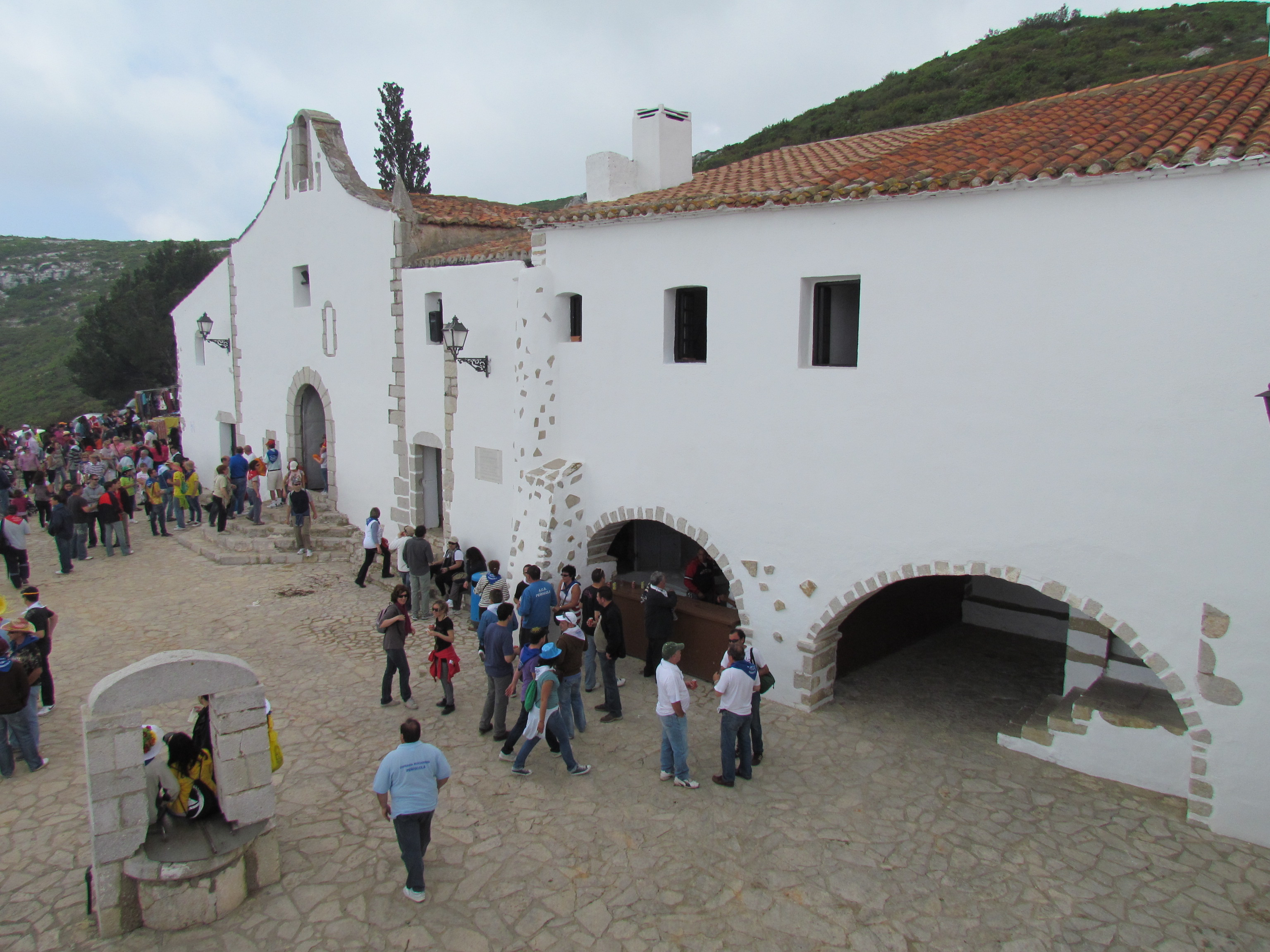 Ermita de Sant Antoni de Peníscola (Baix Maestrat), durant la romeria de 2011